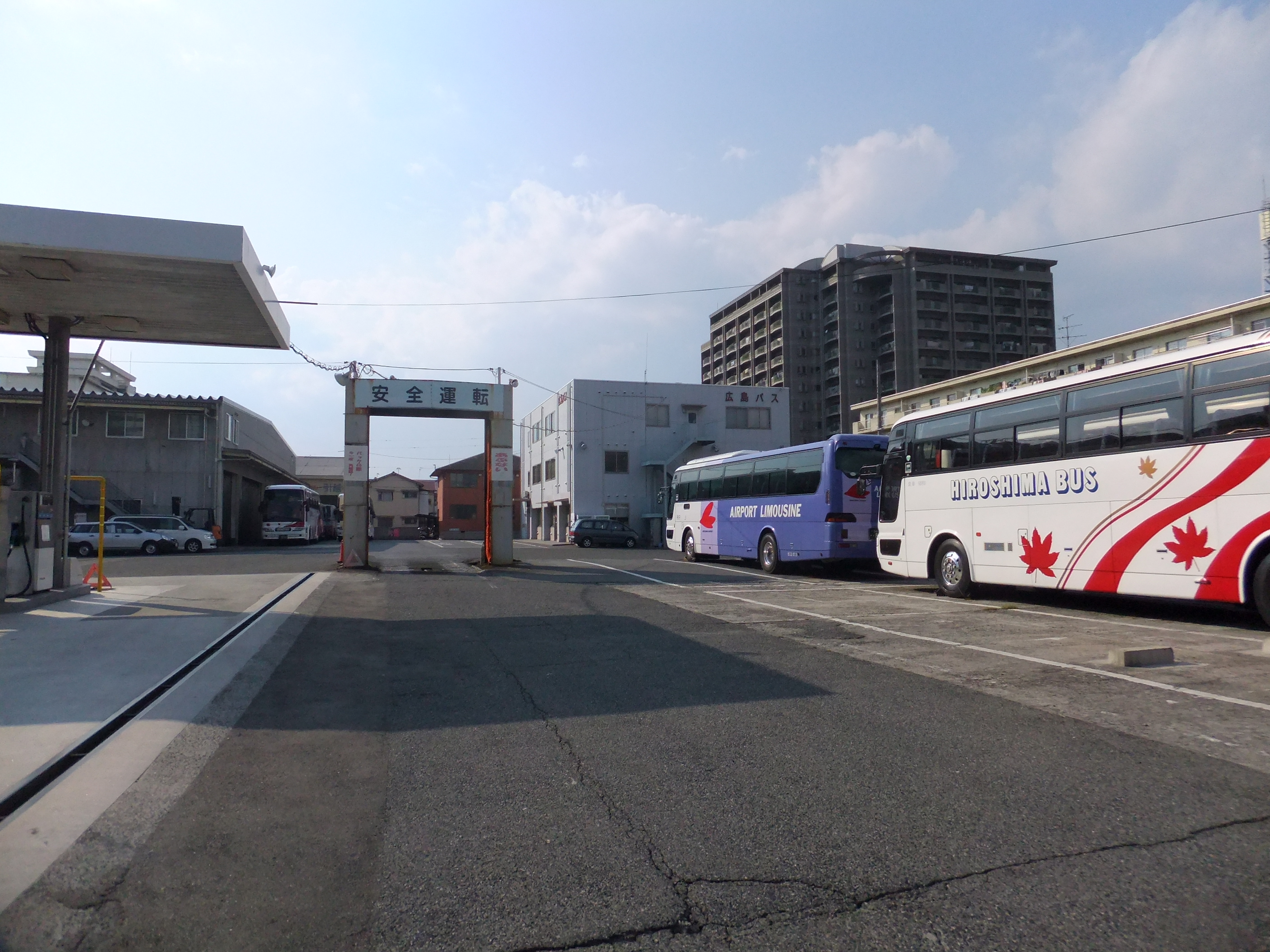 広島バス本社